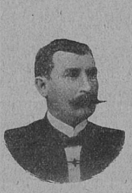 Ladislav Samohýl (1864-?), rakouský rolník a politik z Moravy; poslanec Moravského zemského sněmu